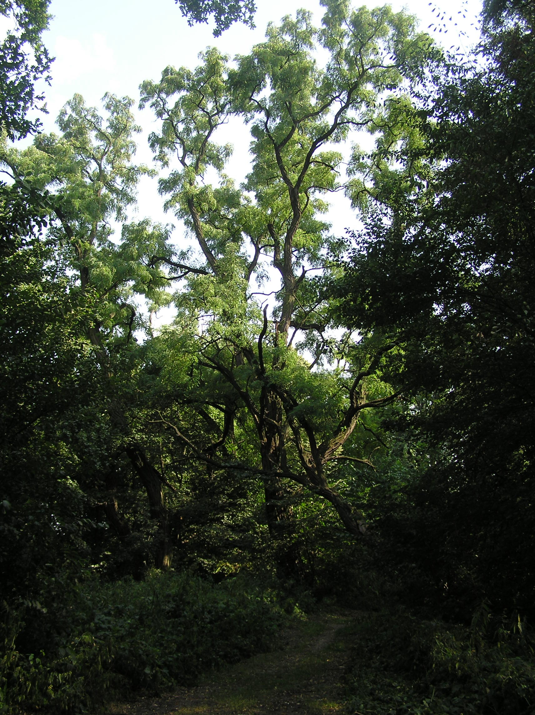 Las Kozanowski